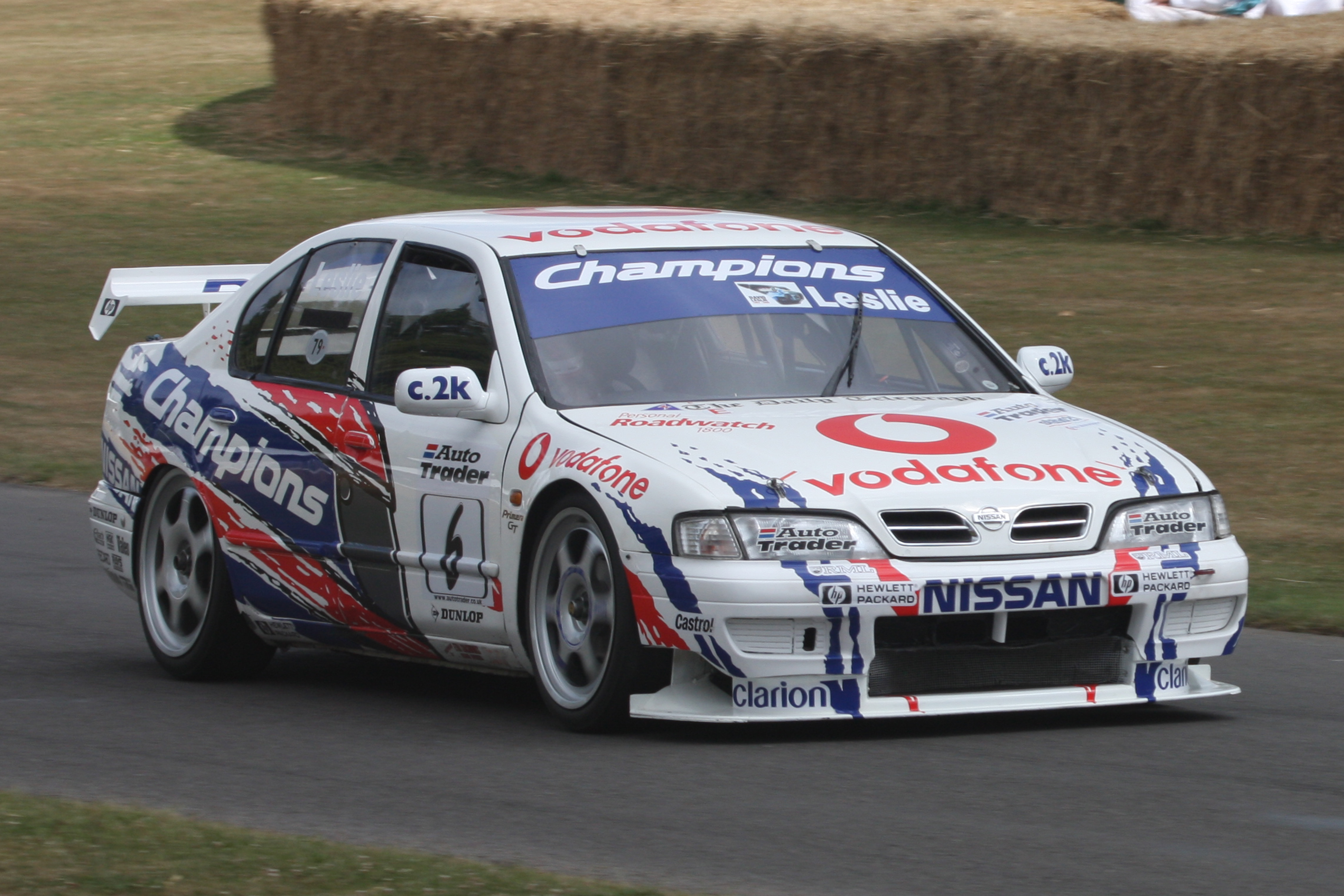 1999 Nissan Primera